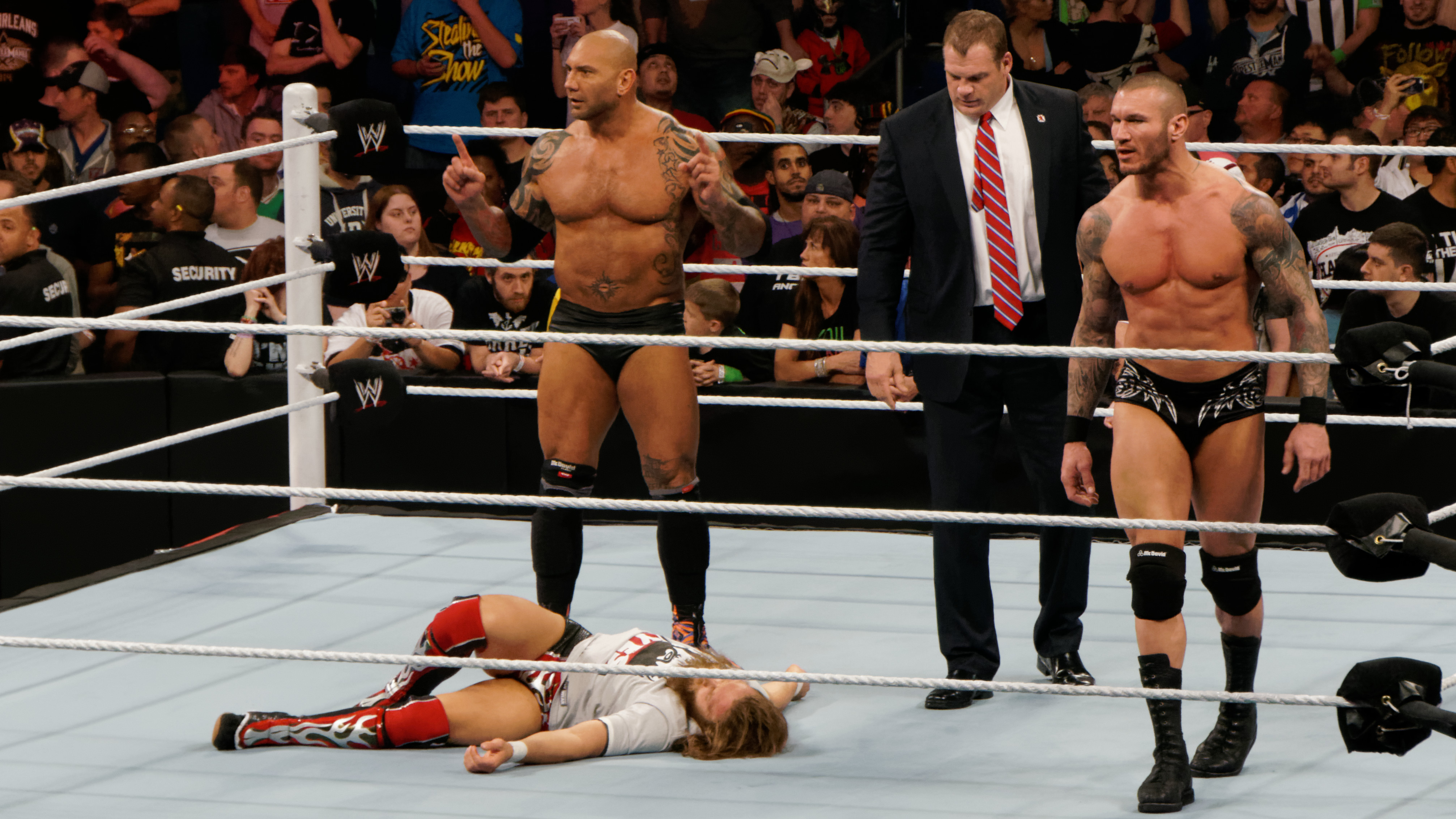 2014-04-07_22-03-25_NEX-6_1831_DxO